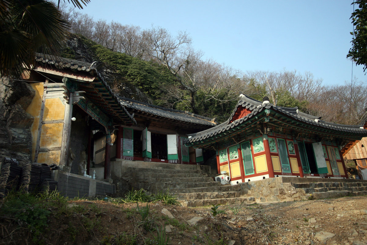 전라남도 완도군 생일도의 있는 학서암은 지은지 300여년이 되는 암자이다.